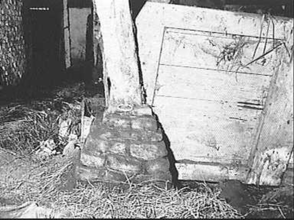 Betuwe/ Constructie: interieur schuur, dunne stijl op poer van moppen (opmerking: Deze afbeelding hebben wij helaas alleen in deze lage resolutie.)